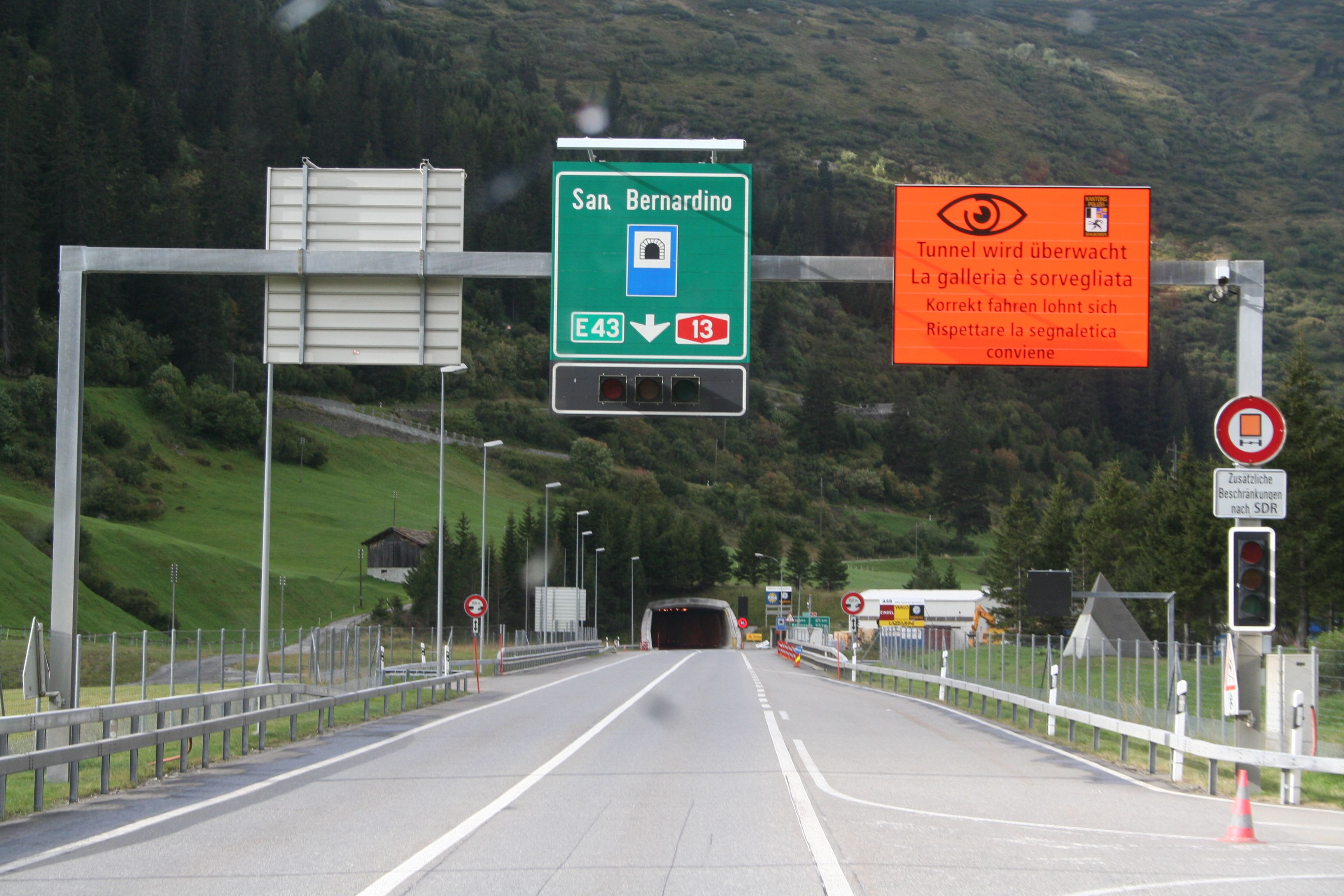 A 13: Einfahrt in den San Bernardino-Tunnel Richtung Süden